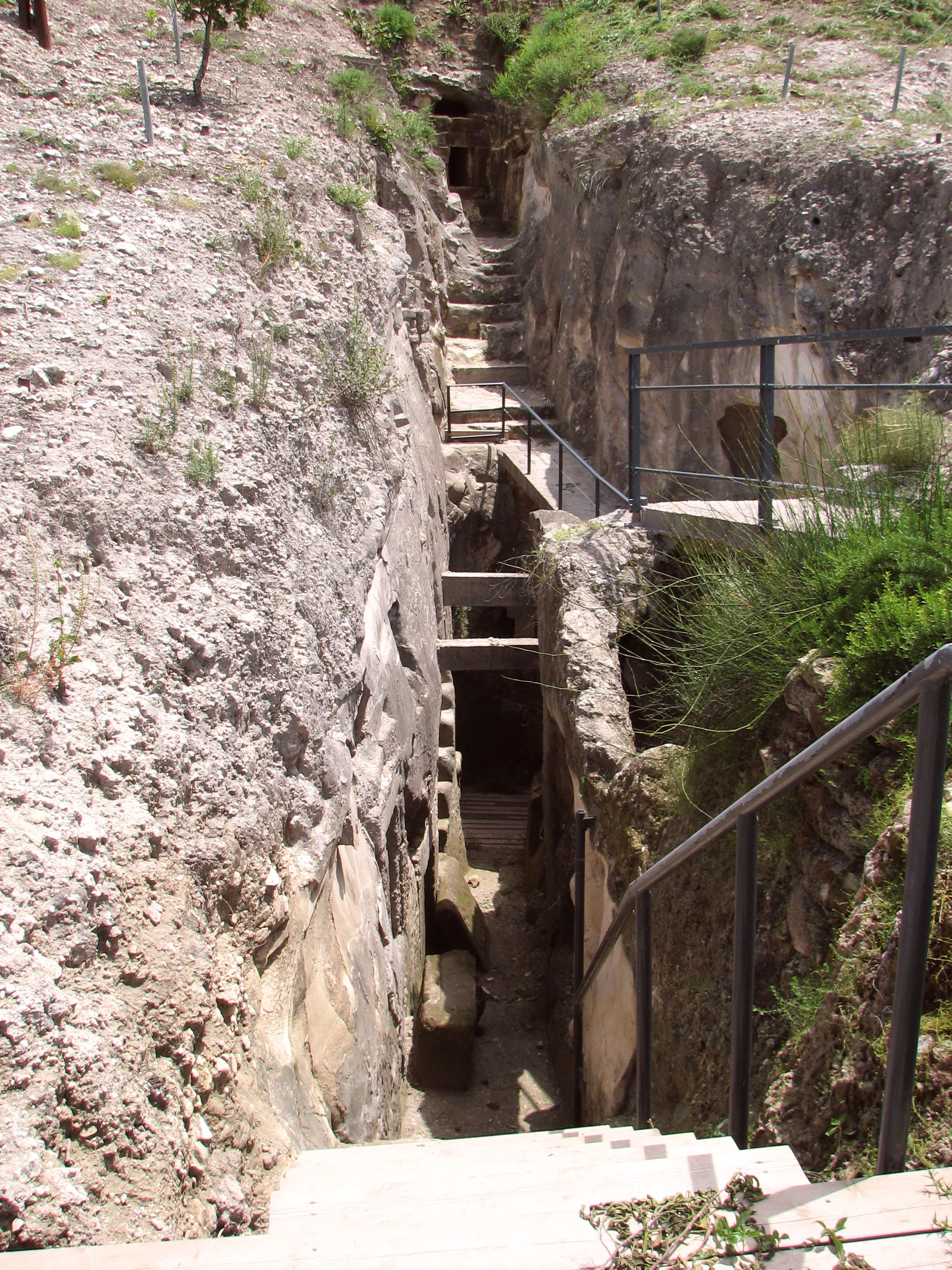 בית שערים הוא אתר ארכאולוגי השוכן בגליל התחתון. במקום התקיים יישוב יהודי חשוב בתקופת בית שני, המשנה והתלמוד. מערת הפרש - מספרה 1. זו המערה הגדולה ביותר שנמצאה בבית שערים. המערה מורכבת מפרוזדור צר ממנו מסתעפים ששה עשר אולמות במפלסי גובה שונים. במערה נמצאו 380 קברים מטיפוסים שונים. הנפוץ בהם הוא קבר מקמר. נמצאו גם קברי כוך וקברים חצובים ברצפת החדר. הכניסה לאולמות הקבורה הייתה דרך דלתות אבן בעלות צירים. במערה נמצאו כתובות בעברית ויוונית, חריתות של סמלים יהודים כמו מנורות, שופרים, לולבים, אתרוגים וכן ספינות, אריות ועוד. שמה של המערה ניתן לה על שם תבליט פרש הרוכב על סוס שנמצא בה. במערה נמצאו כתובות המעידות על קבורתם במקום של יהודים מתדמור שבסוריה של היום.